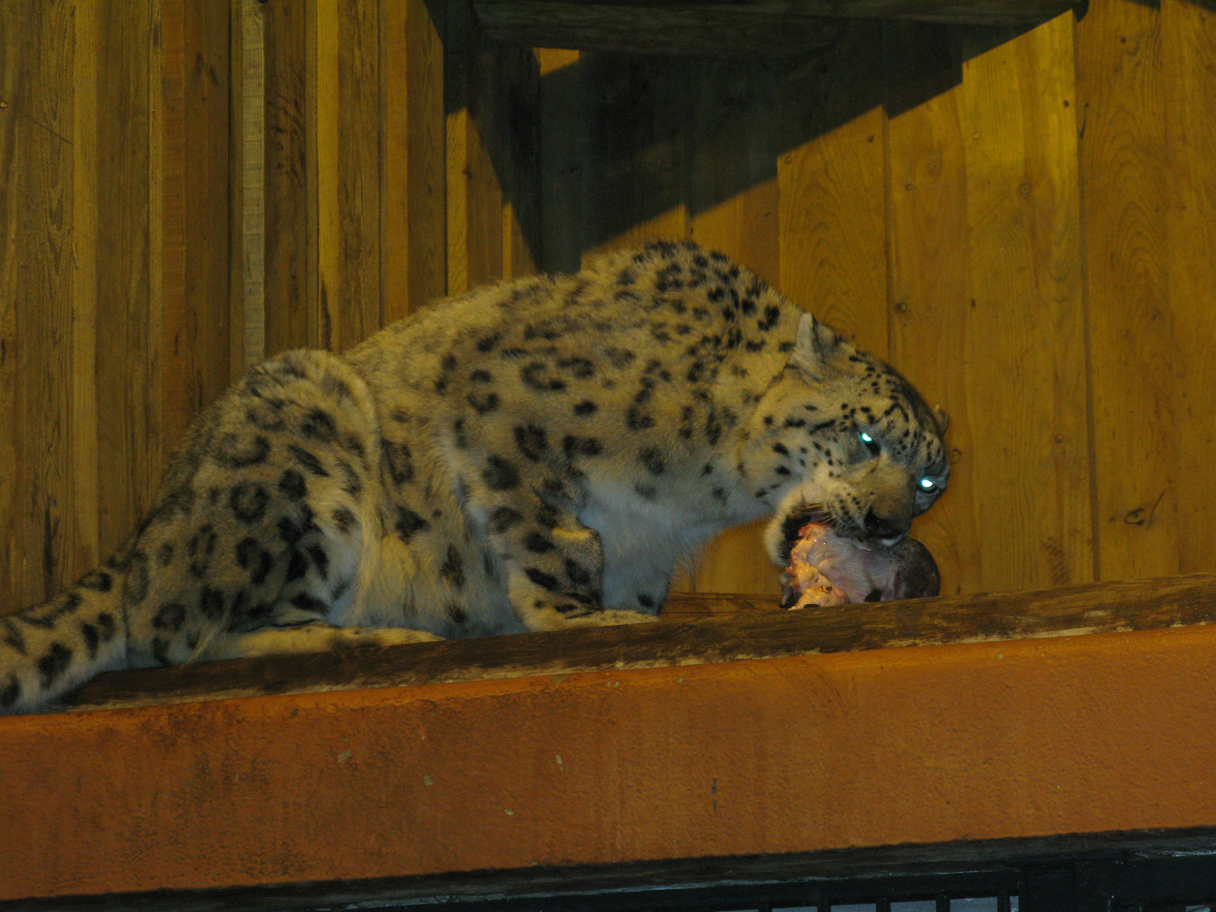 Panthère des neiges (panthera uncia) mangeant, ménagerie du Jardin des Plantes de Paris.